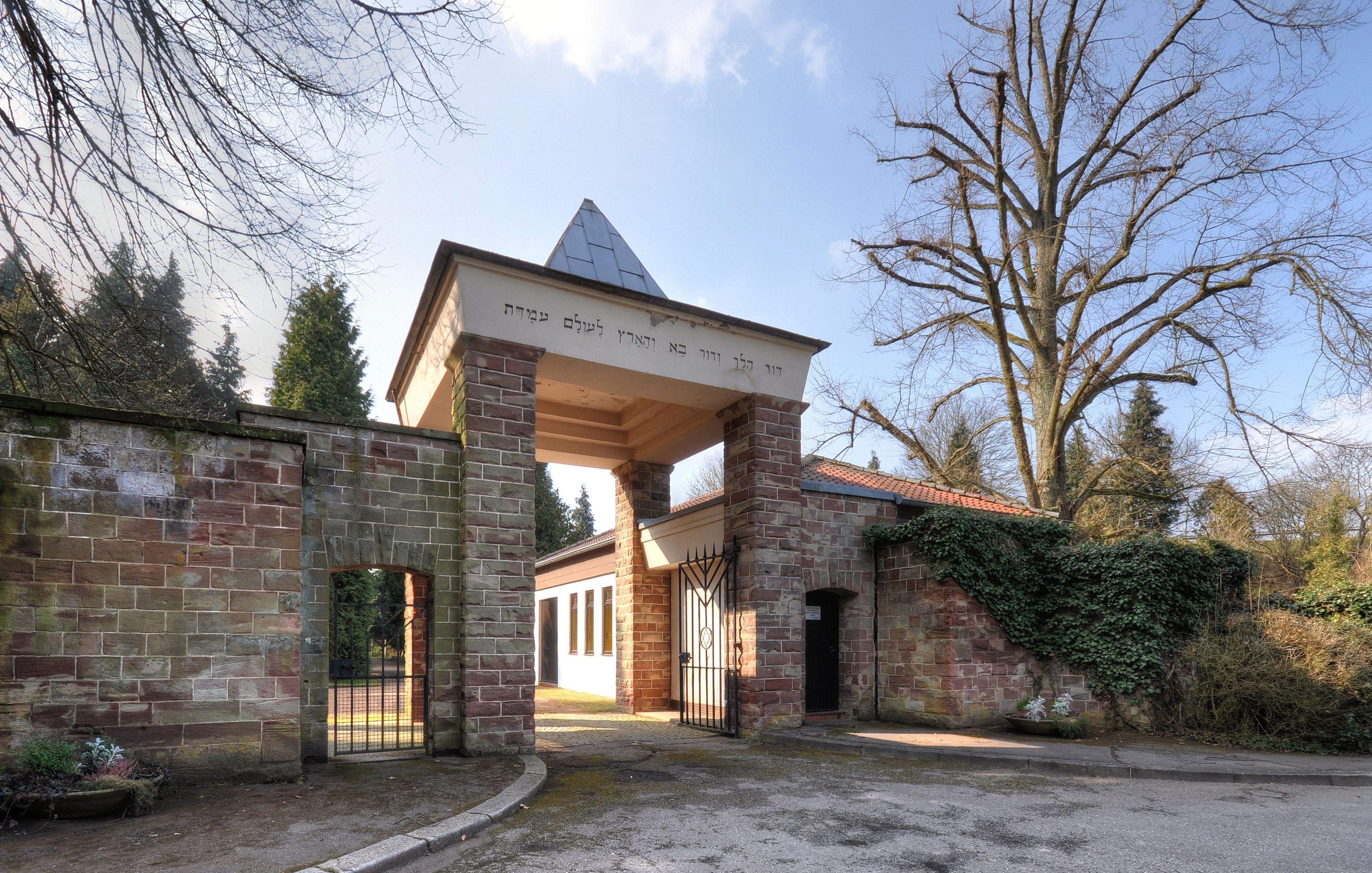 Eingangspavillon des jüdischen Friedhofs in Alt-Saarbrücken, zum Zollstock.